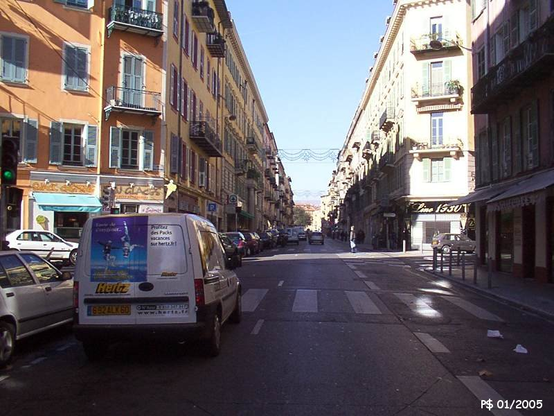 La rue Cassini dans toute sa longueur. La vue est prise à son départ de la Place Ile-de-Beauté.